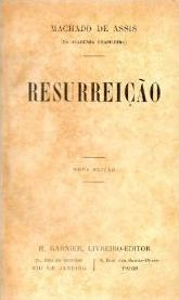 Cover page of Ressurreição, by Joaquim Maria Machado de Assis (1839 – 1908).